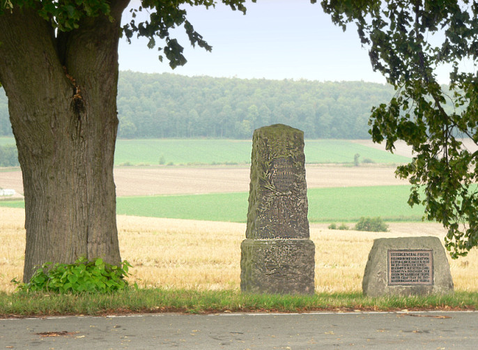 Grabstein und Gedenkstein für Freiherr Fuchs von Bimbach an der Stelle der Schlacht bei Lutter am Barenberge, an der er tödlich verletzt wurde, heute Parkplatz an der B 248